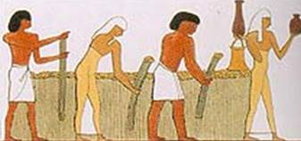 Egyptiens récoltant le lin (hypogée de Thèbes).